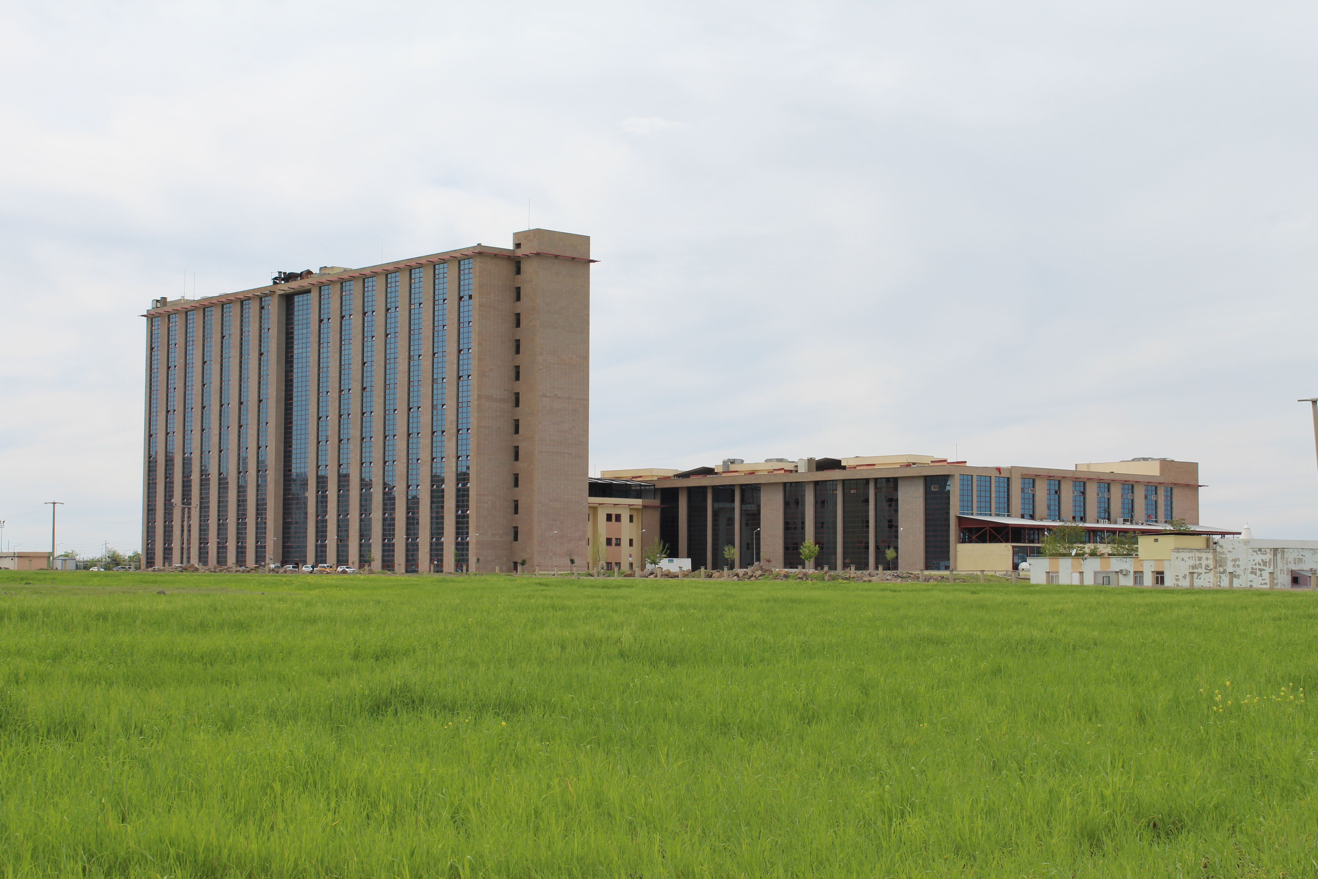 Gazi Yaşargil Eğitim ve Araştırma Hastanesi görünümü